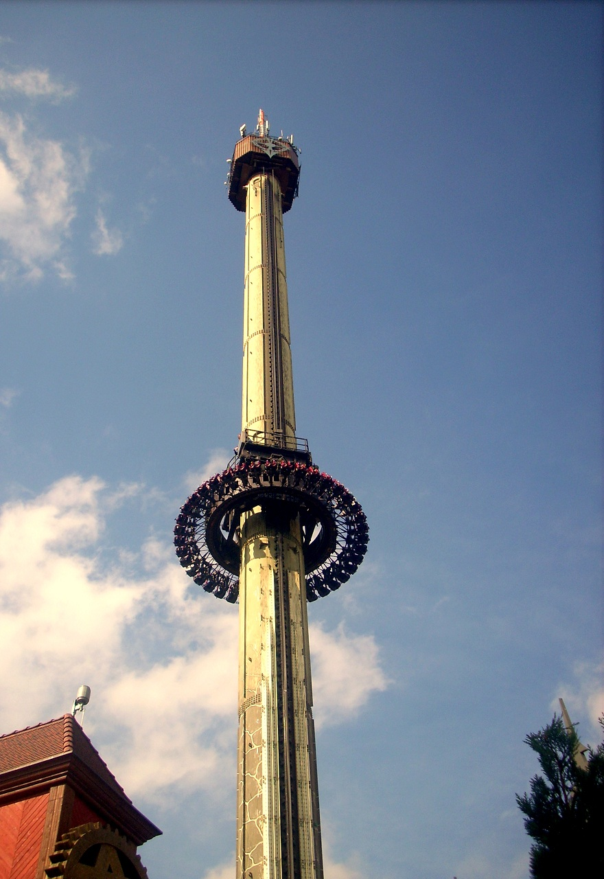 Leere Gondel des Gyro-Drop-Towers Scream.